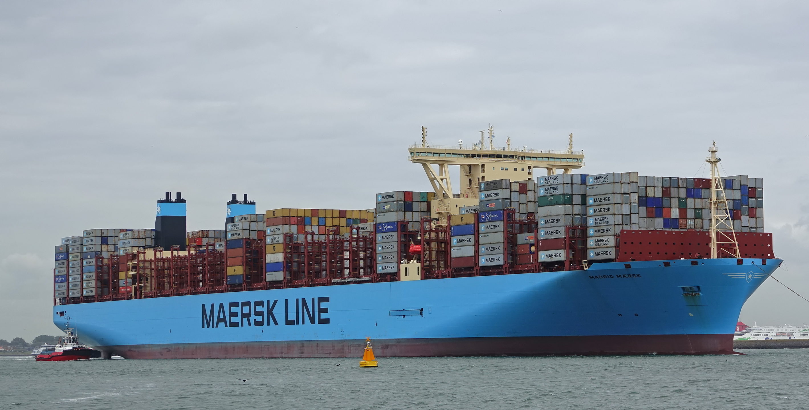 MADRID MAERSK voor de eerste keer in Rotterdam 12-6-2017